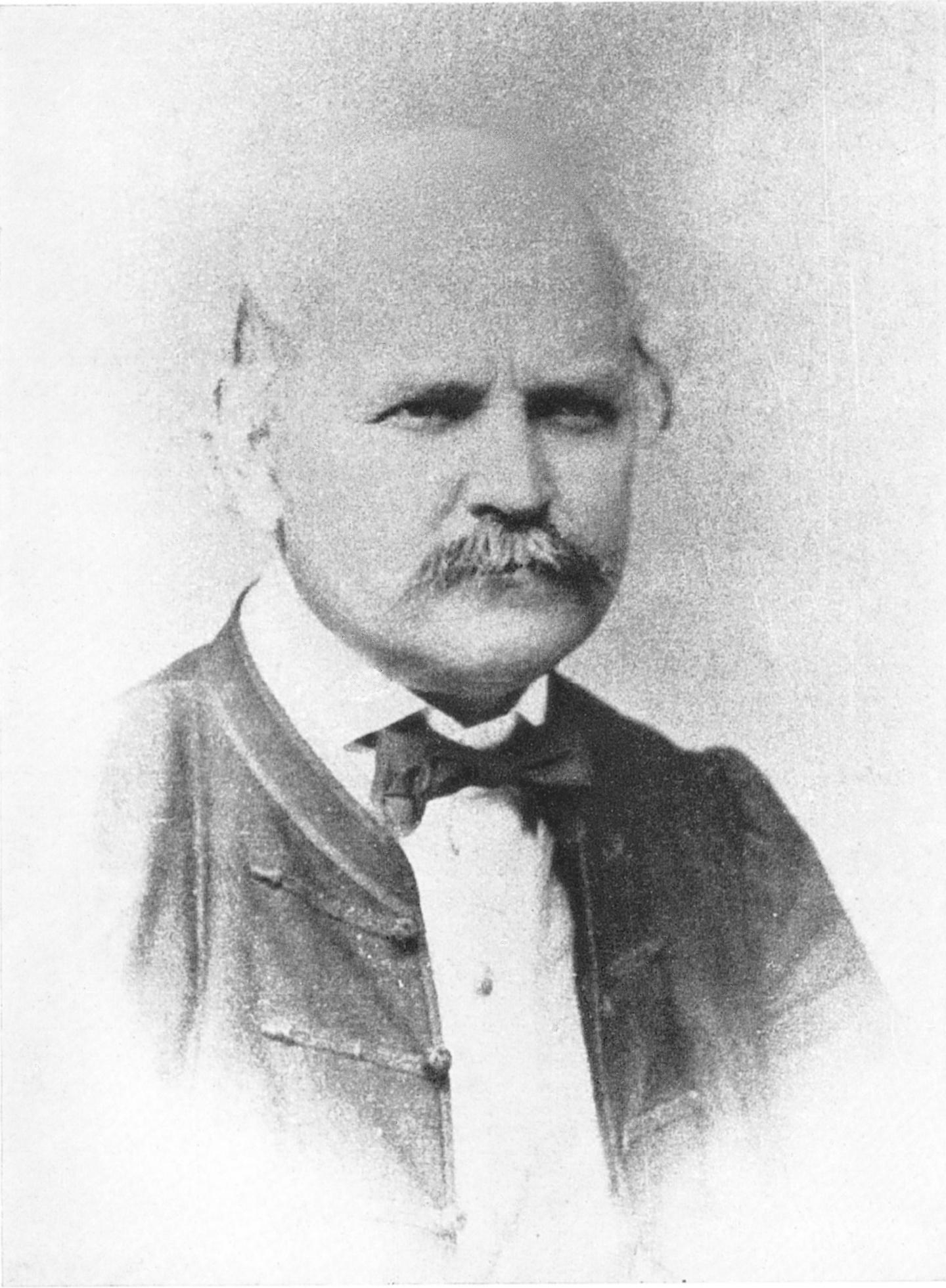 Ignaz Semmelweis 1861